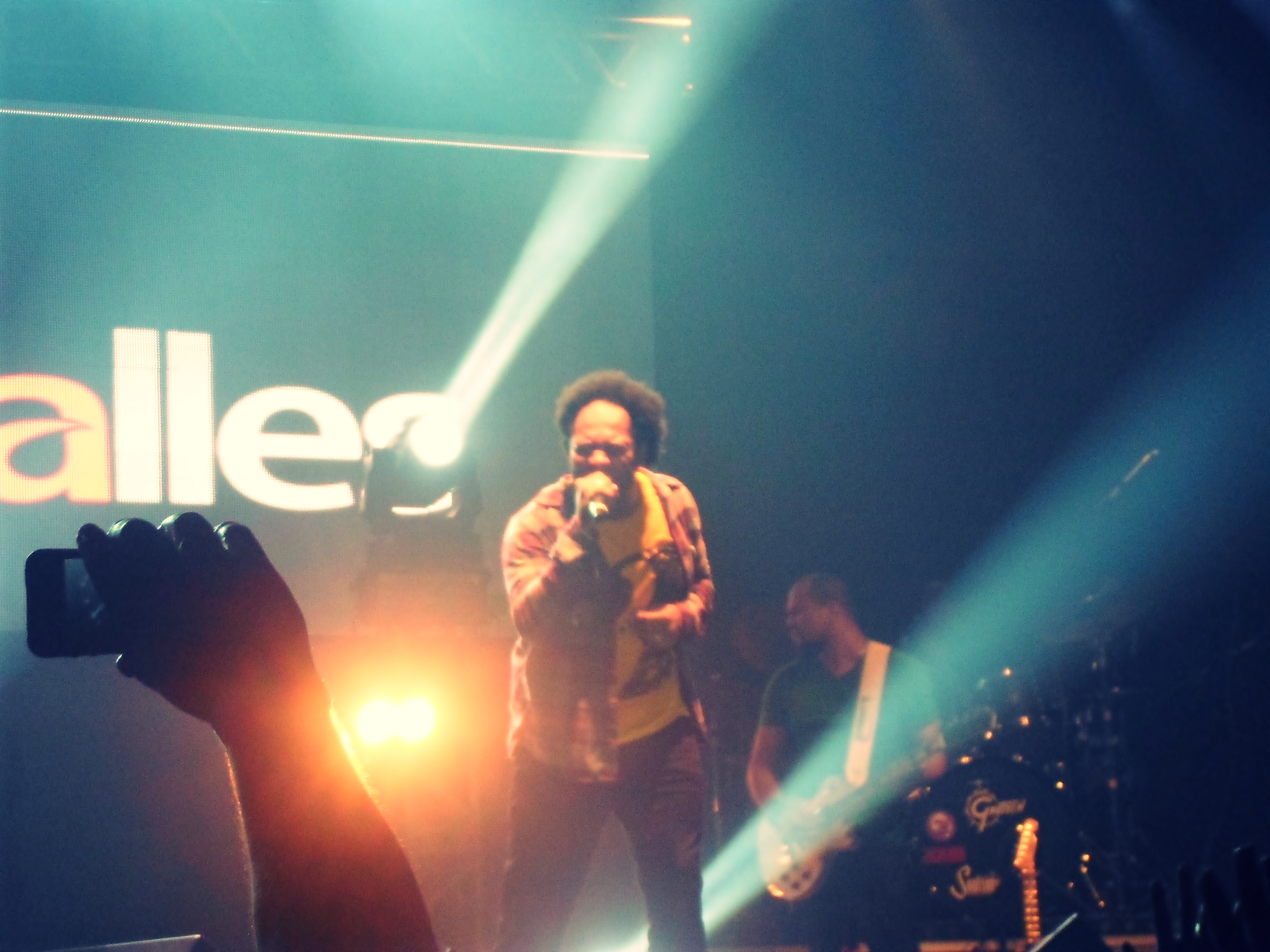 Category:Thalles Roberto durante um show em Fortaleza, no Centro de Eventos do Ceará.